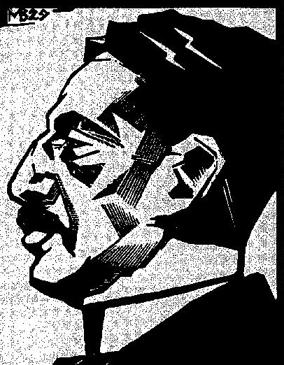 Portret van Emanuel Boekman door Meijer Bleekrode, houtsnede, 1929